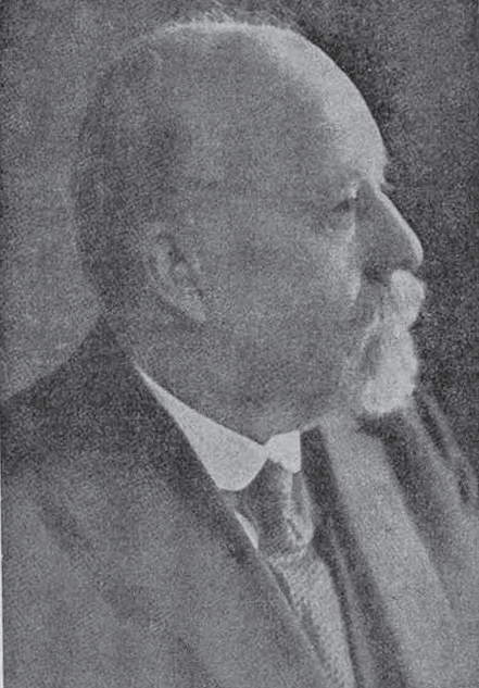 Lyubomir Miletich